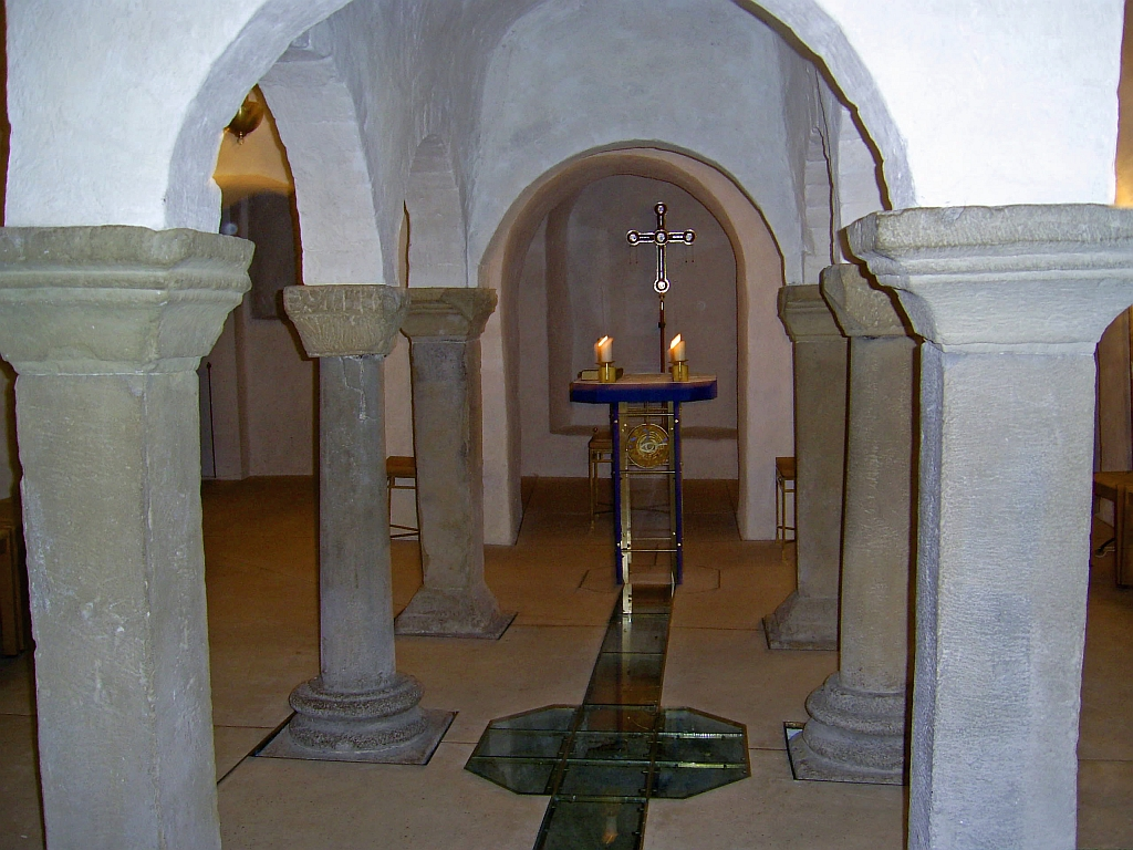 St Mang Krypt Origional Grab von St Mang